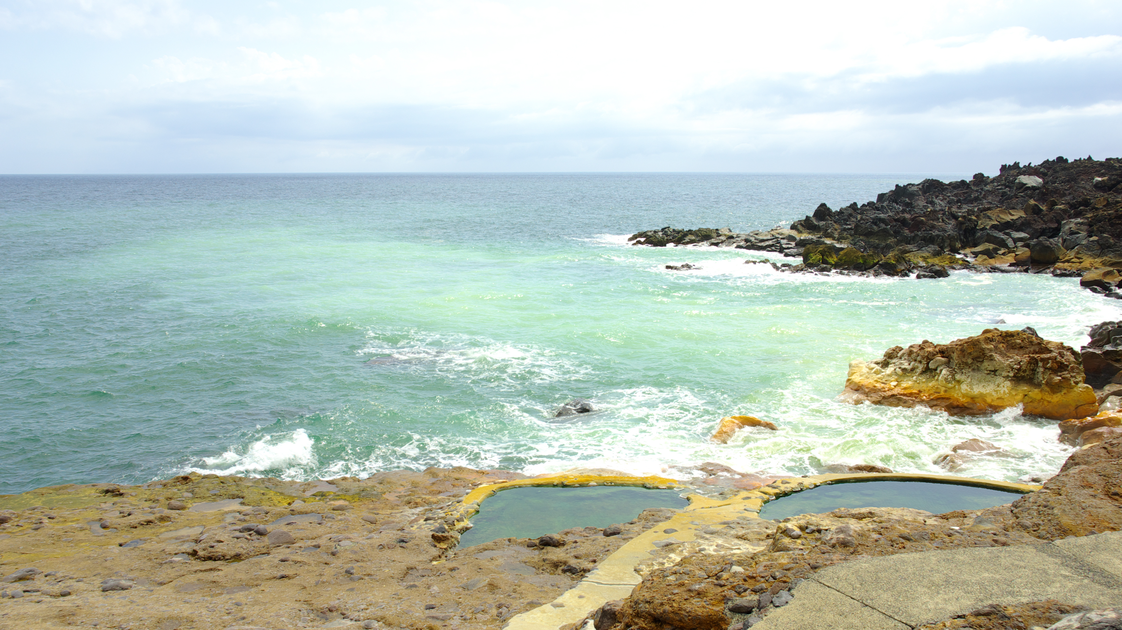 薩摩硫黄島東温泉